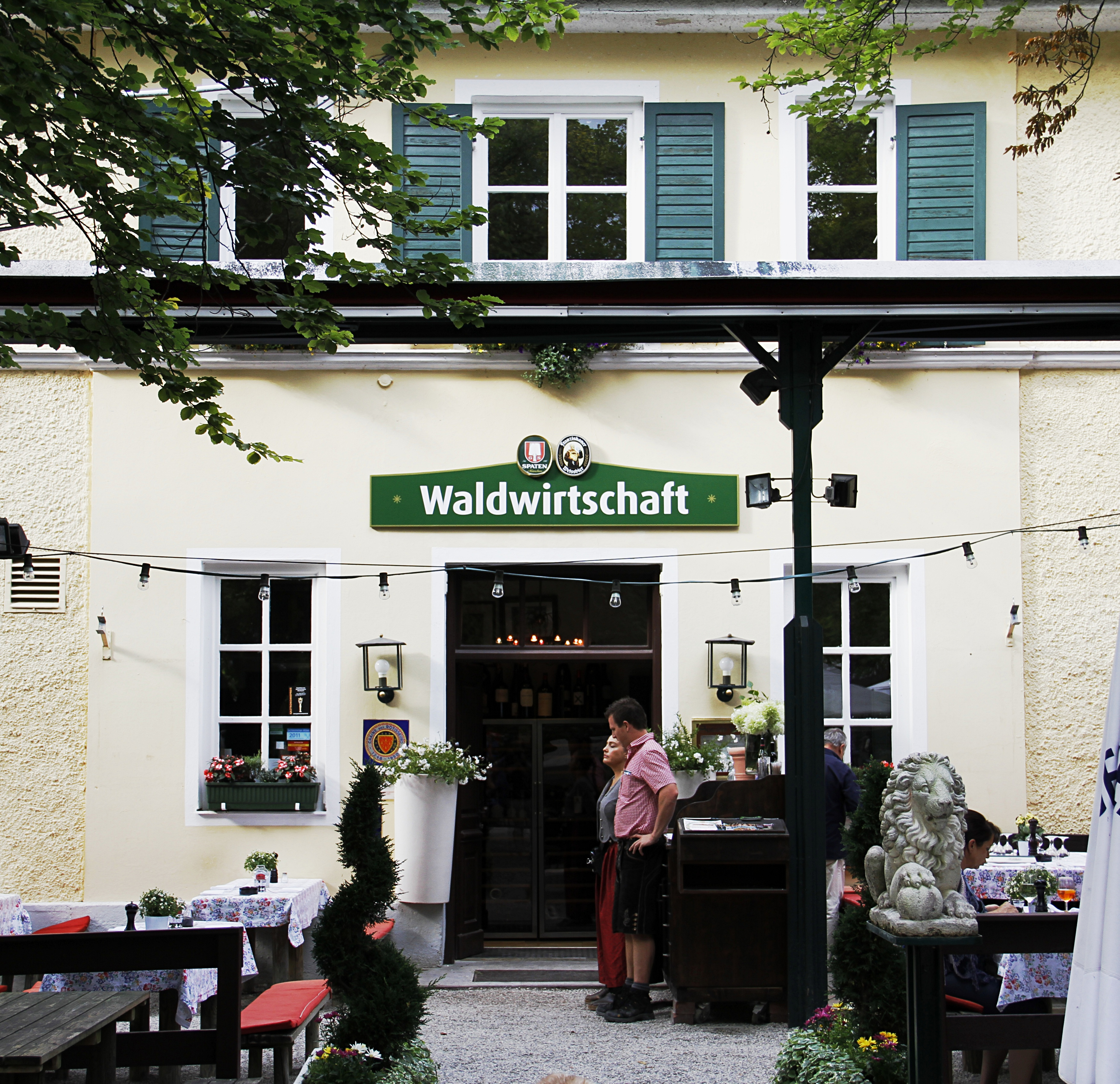 Waldwirtschaft, Großhesselohe